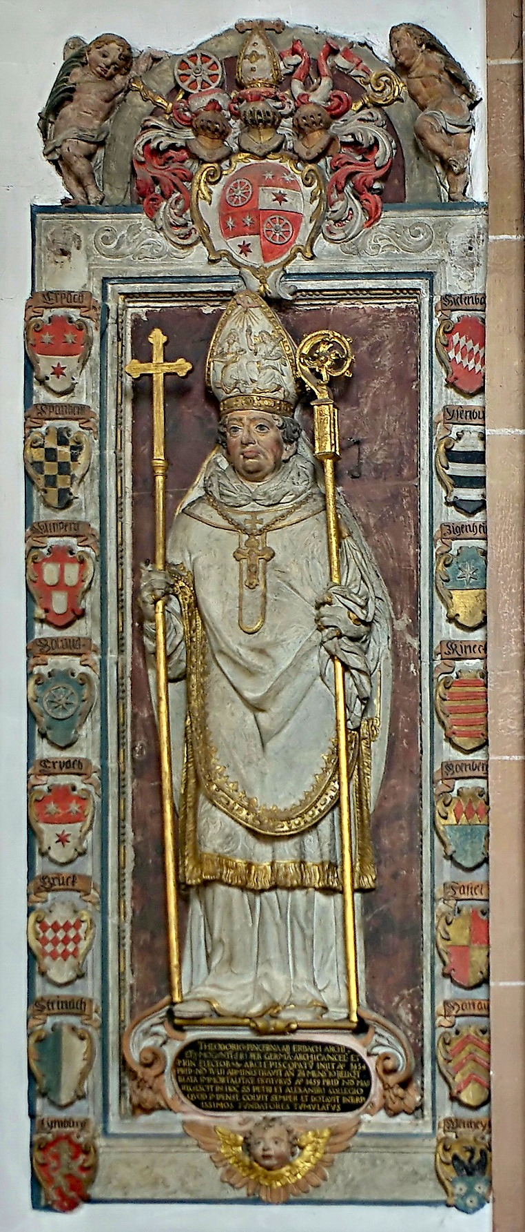 Epitaph des Fürstbischofs Dietrich Schenk von Erbach in der Stiftskirche St. Peter und Alexander in Aschaffenburg